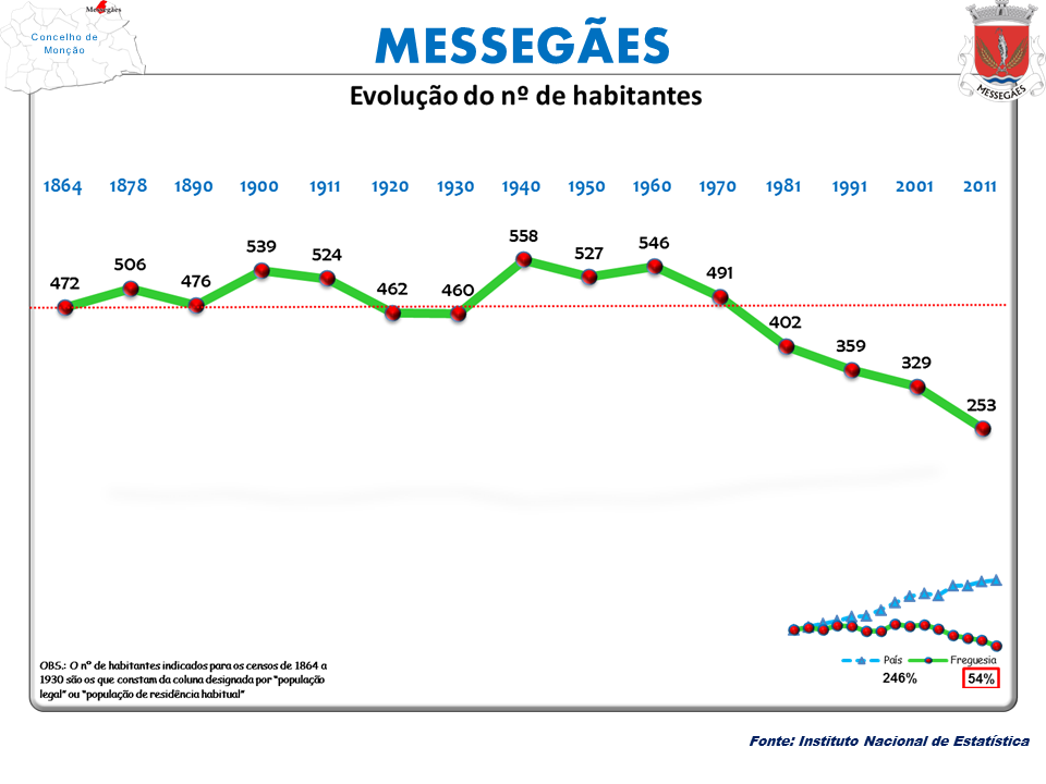 Censos 1864/2011